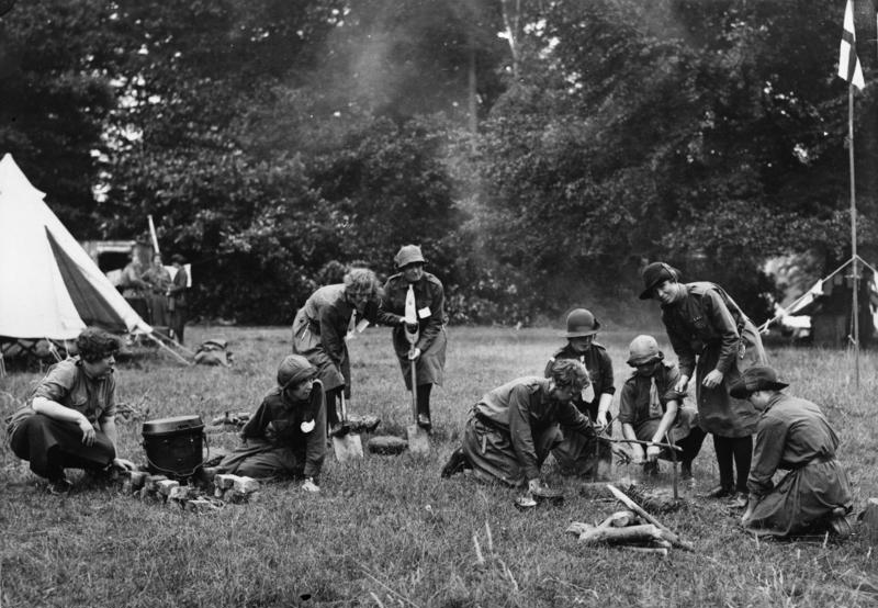 Aus dem Mutterland der Pfadfinder ! Die englische Pfadfinderbewegung hat eine grössere Ausbreitung wie in Deutschland. Die englischen Pfadfinderinnen sind sehr selbständig und stehen ihren männlichen Kollegen in keiner Beziehung nach. Sie campieren im Freien, schlagen ihre Zelte auf und bereiten sich selbst ihre Mahlzeiten.